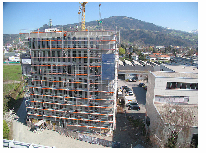 LCT ONE fertiger Rohbau 2012